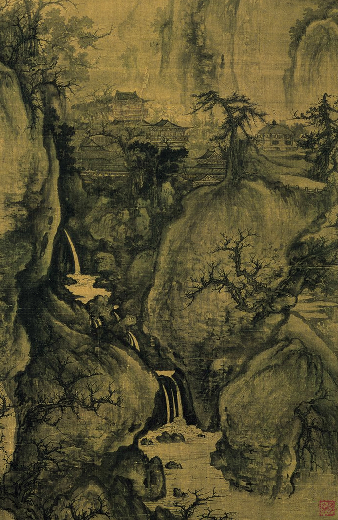 Го Си. 1072г Тайбей.